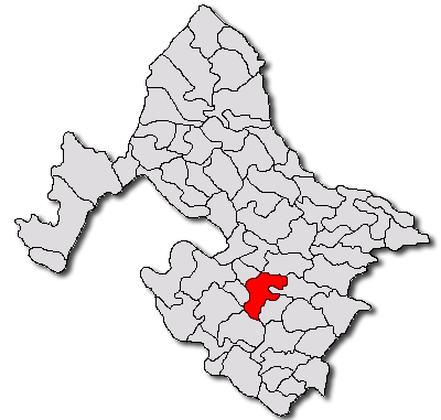 Categorie:Hărţi ale judeţului Mehedinţi